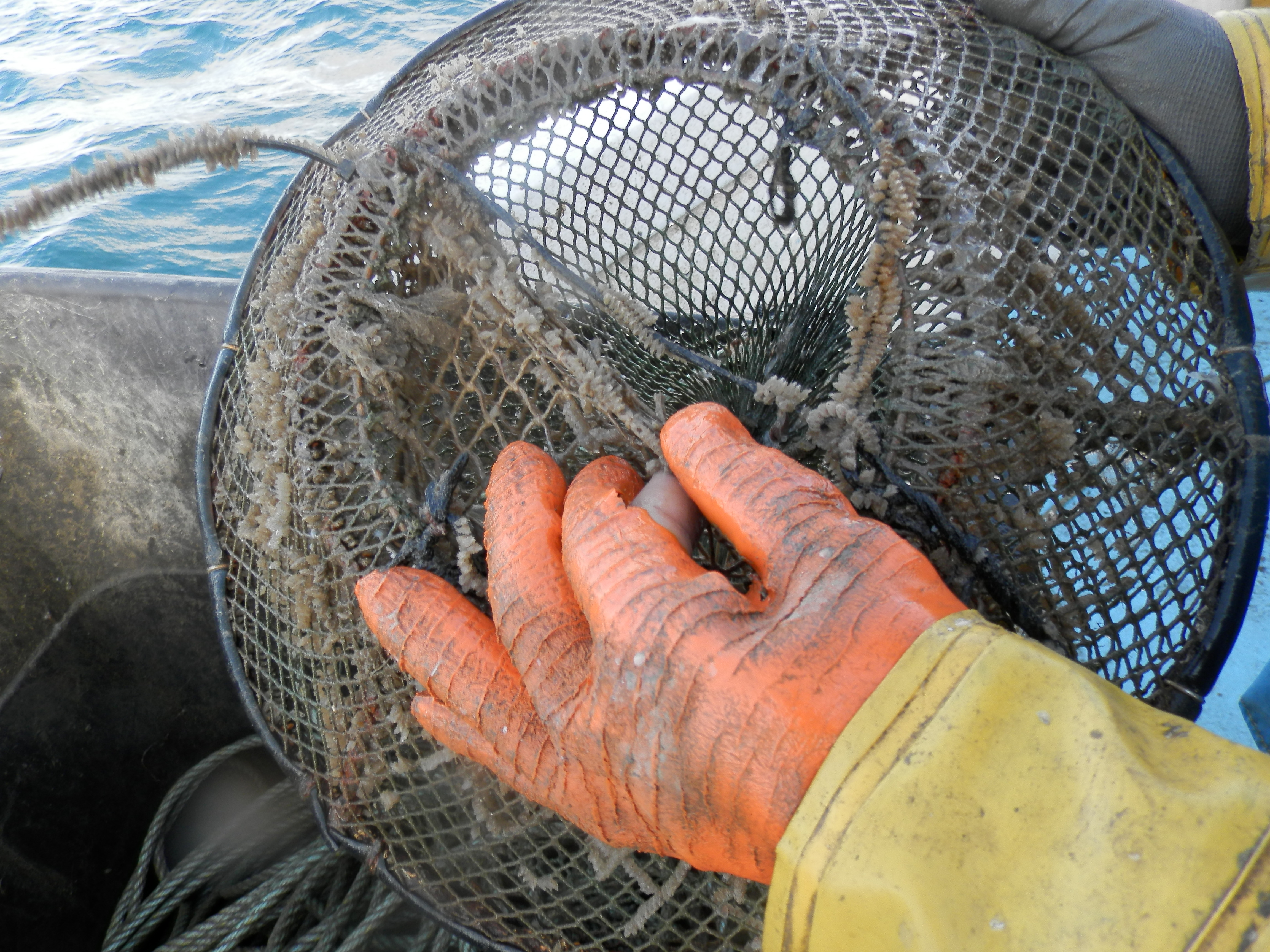 Technique de pêche de la Noisette de mer : la nasse